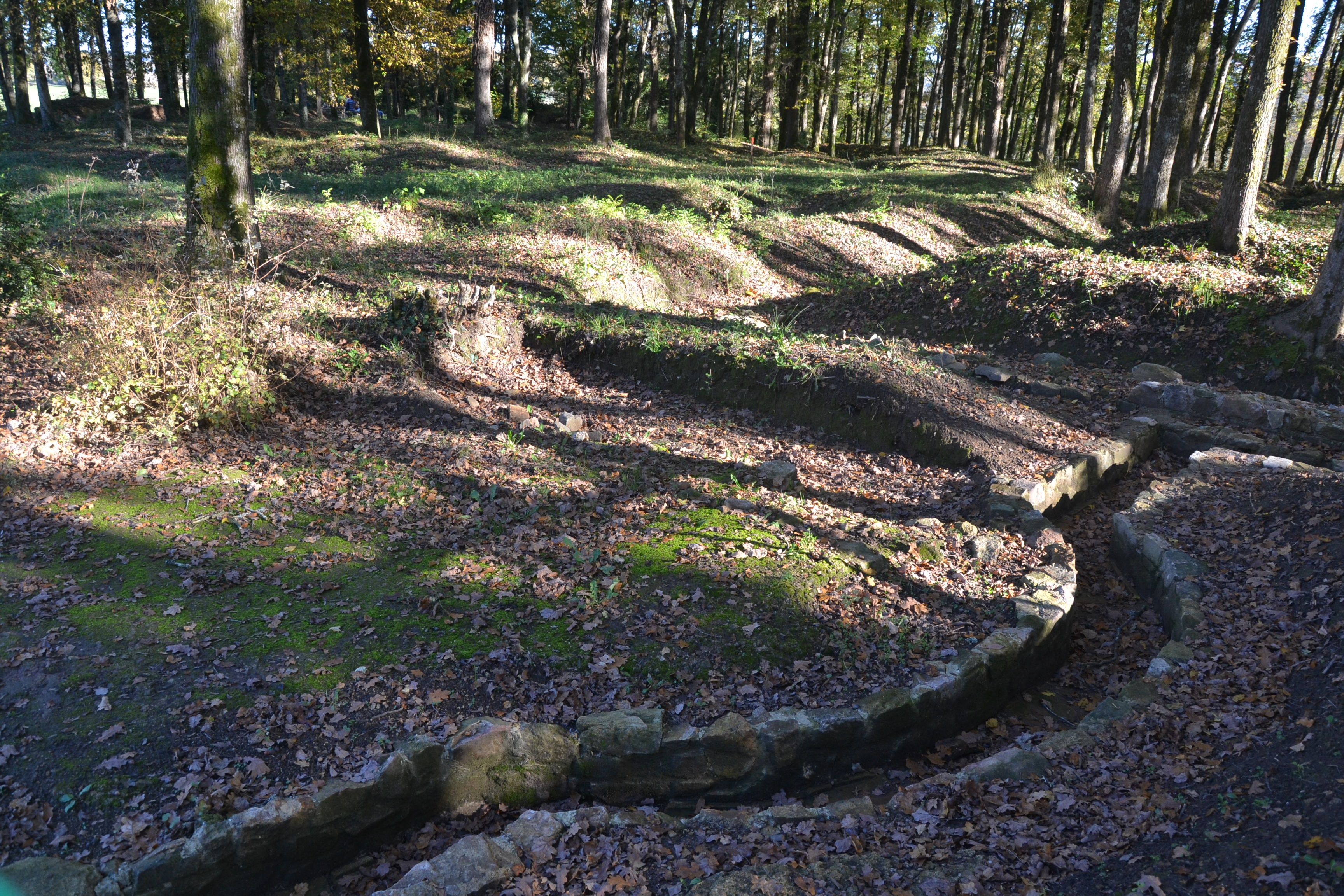 Vestiges gallo-romains de la villa d'Antone (Pierre-Buffière, Haute-Vienne, France).